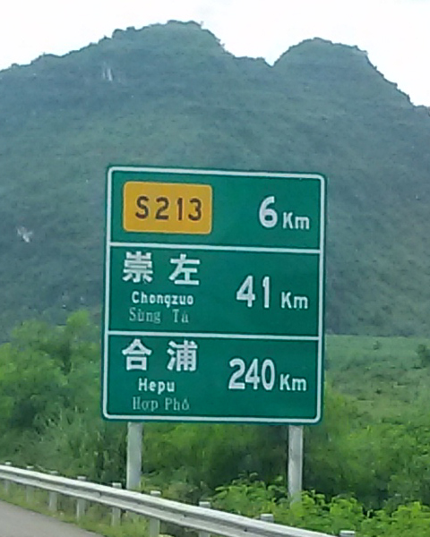 粵語: 喺合那高速，嚿牌好多時出現有中英越三文標記。